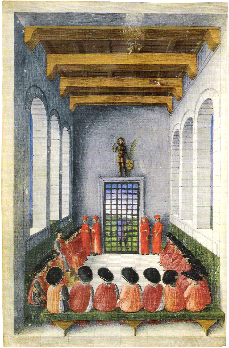 Assemblée de l'Ordre du croissant par Giovani Bellini tempera sur parchemin in bibliothèque de l'arsenal Ms 940 fol CV. Texte de la page : Chapitre tenu par René duc d'Anjou Roy de Sicile, instituteur de l'Ordre du Croissant ou sont les chevaliers en habit de l'Ordre.